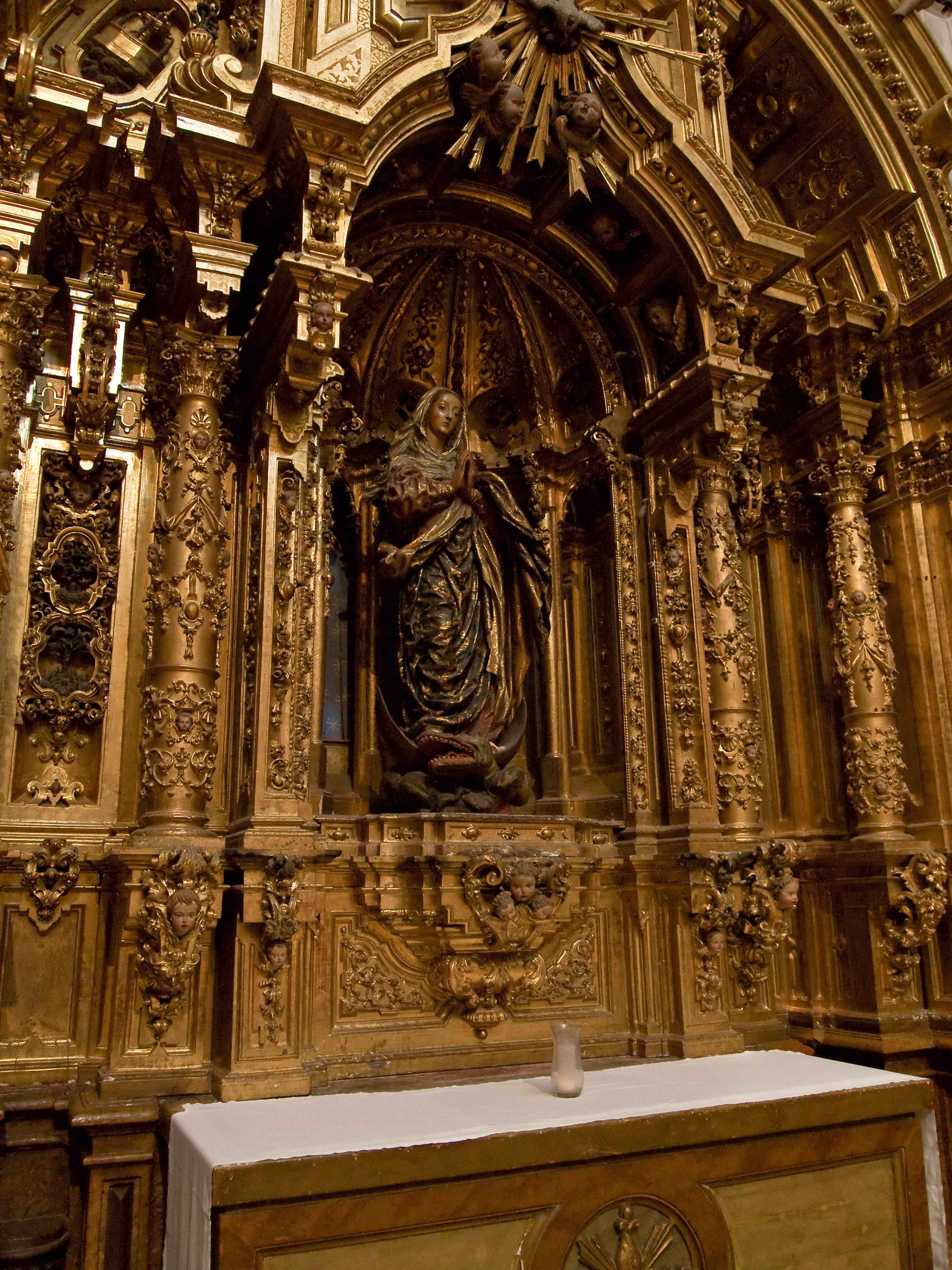 "A Inmaculada" de Francisco de Moure. Forma parte dos cinco retablos que lle encargaron a Francisco de Moure para a igrexa bella. Na actualidade, do conxunto, consérvase a imaxe da Inmaculada e a imaxe de San Benito nos retablos do cruceiro da igrexa.